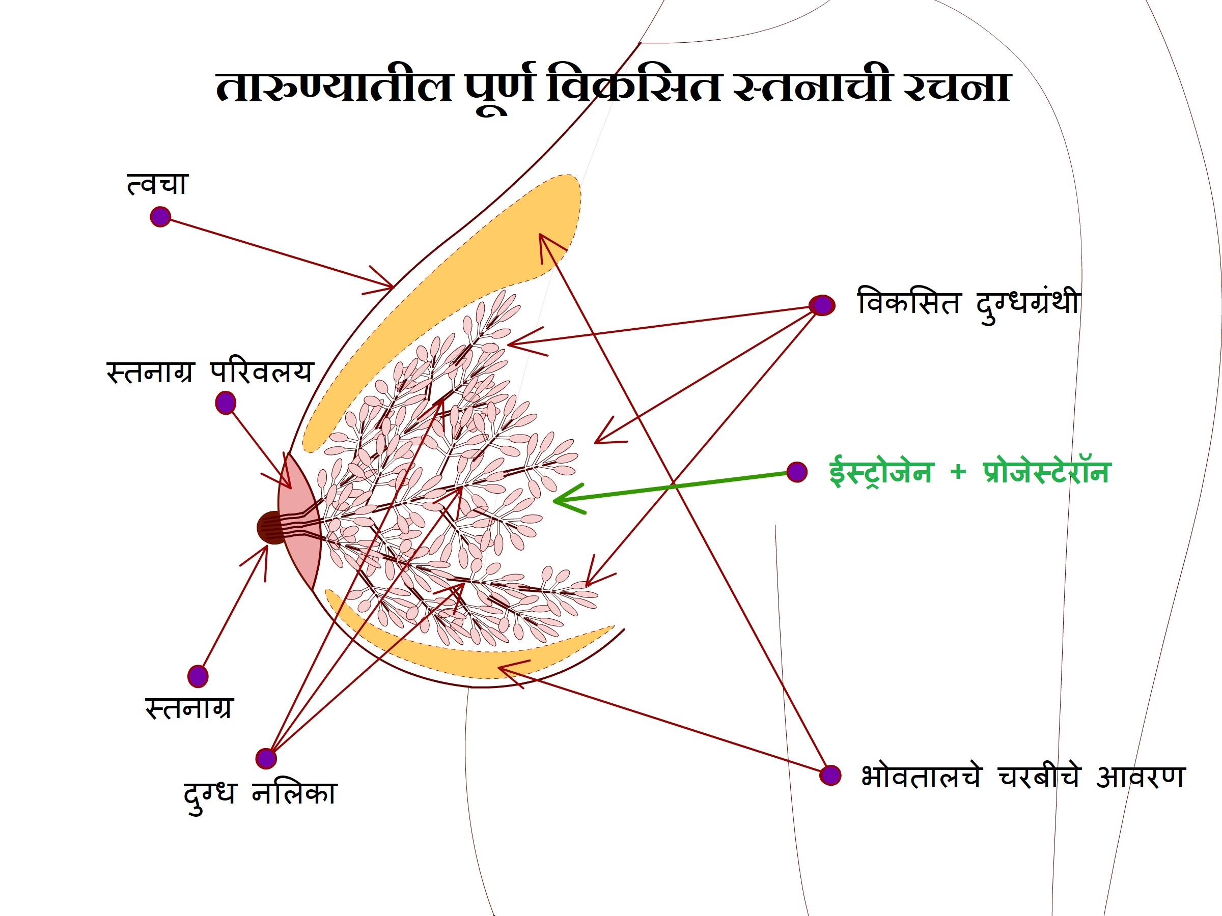 तारुण्यातील पूर्ण विकसित स्तनाची रचना बाजूने दाखवणारी योजनाबद्ध आकृती. दुग्धग्रंथींची खंडात्मक रचना, प्रत्येक खंडातून निघणार्‍या व स्तनाग्रावर स्वतंत्रपणे उघडणार्‍या दुग्धनलिका, भोवतालचे चरबीचे आवरण.